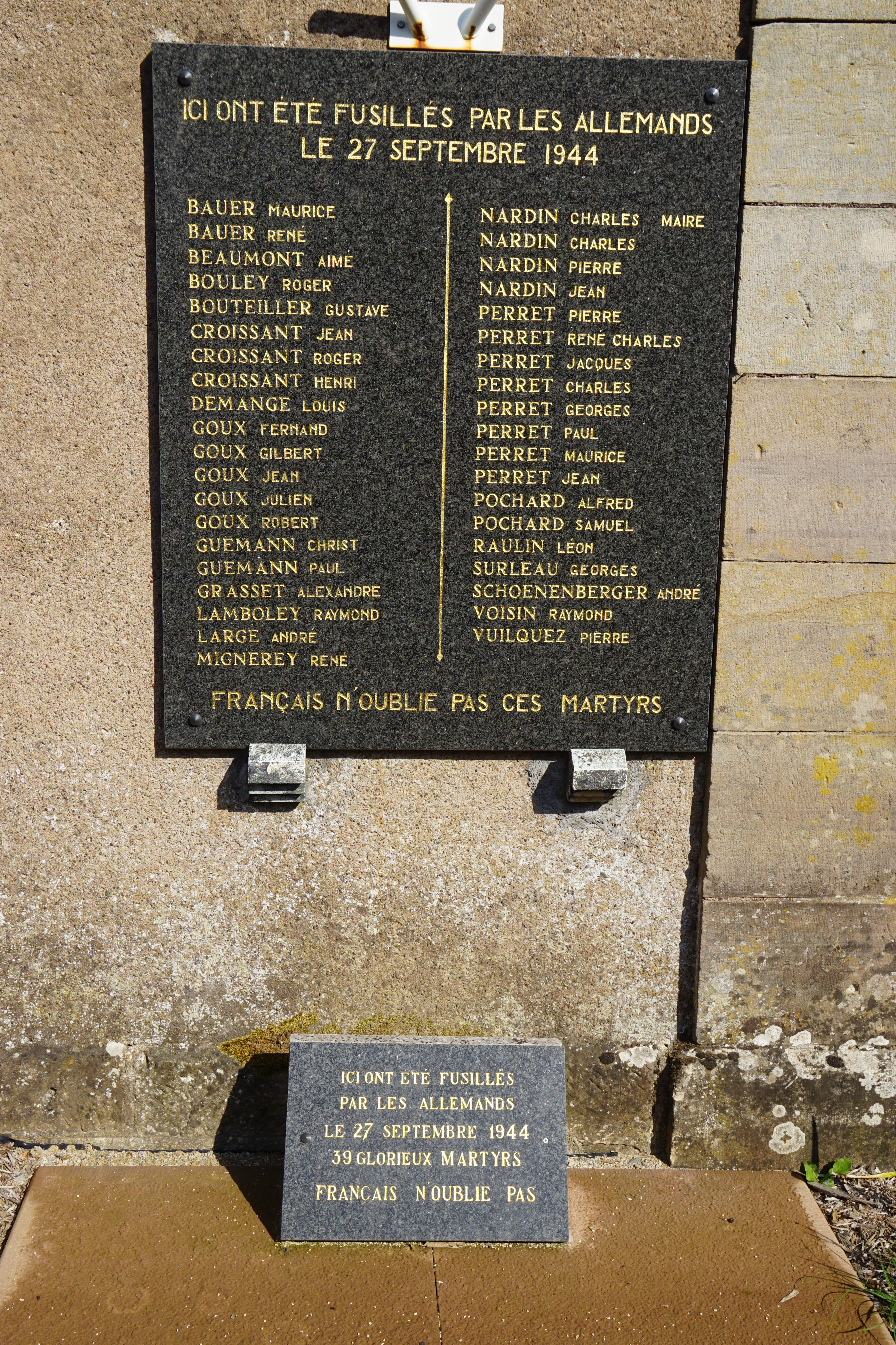 Plaque commémorative en hommage aux fusillés de Chenebier.